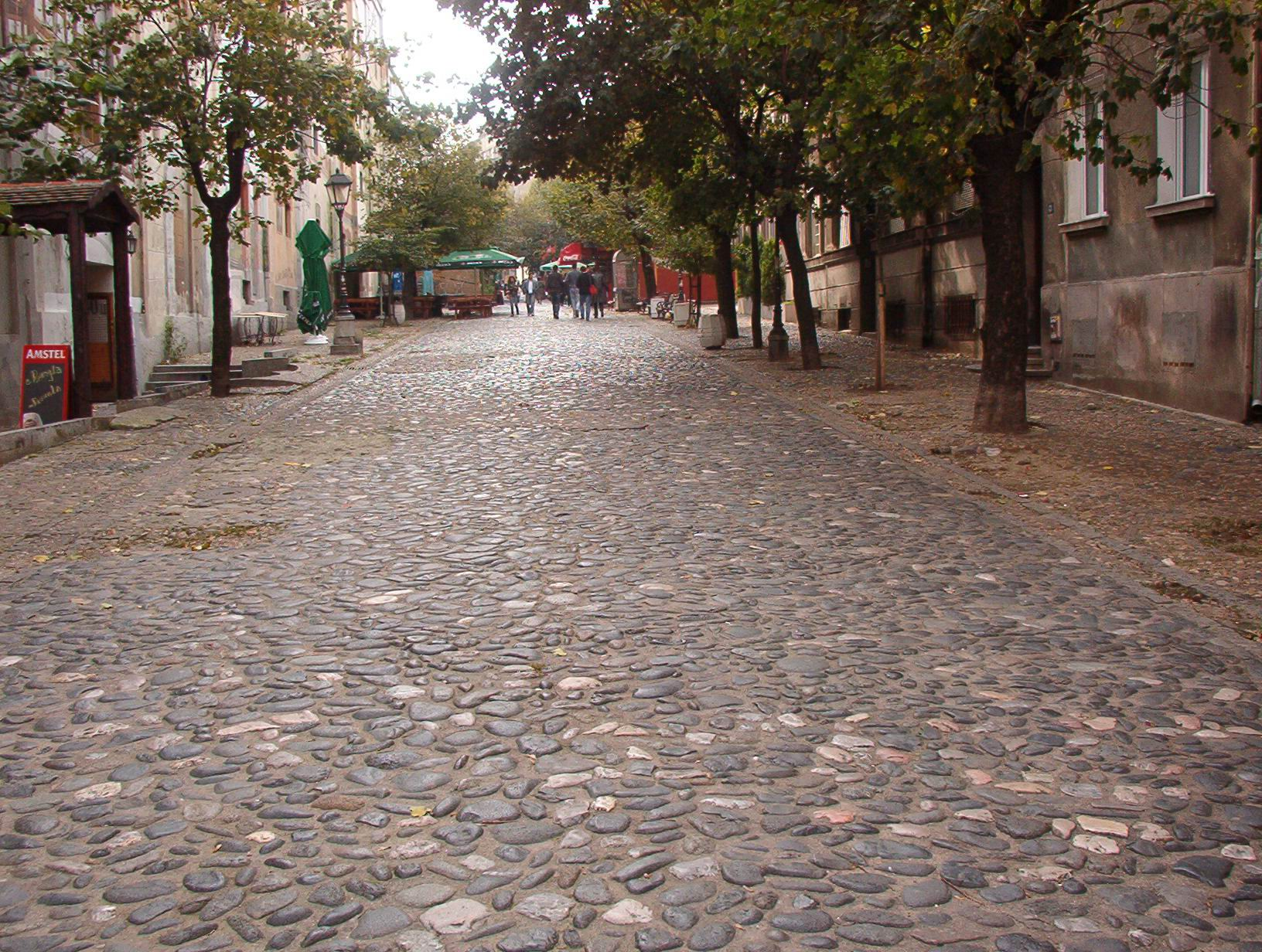 Скадарлија у Београду Licensing Fotografisao Goldfinger. U javnoj upotrebi!